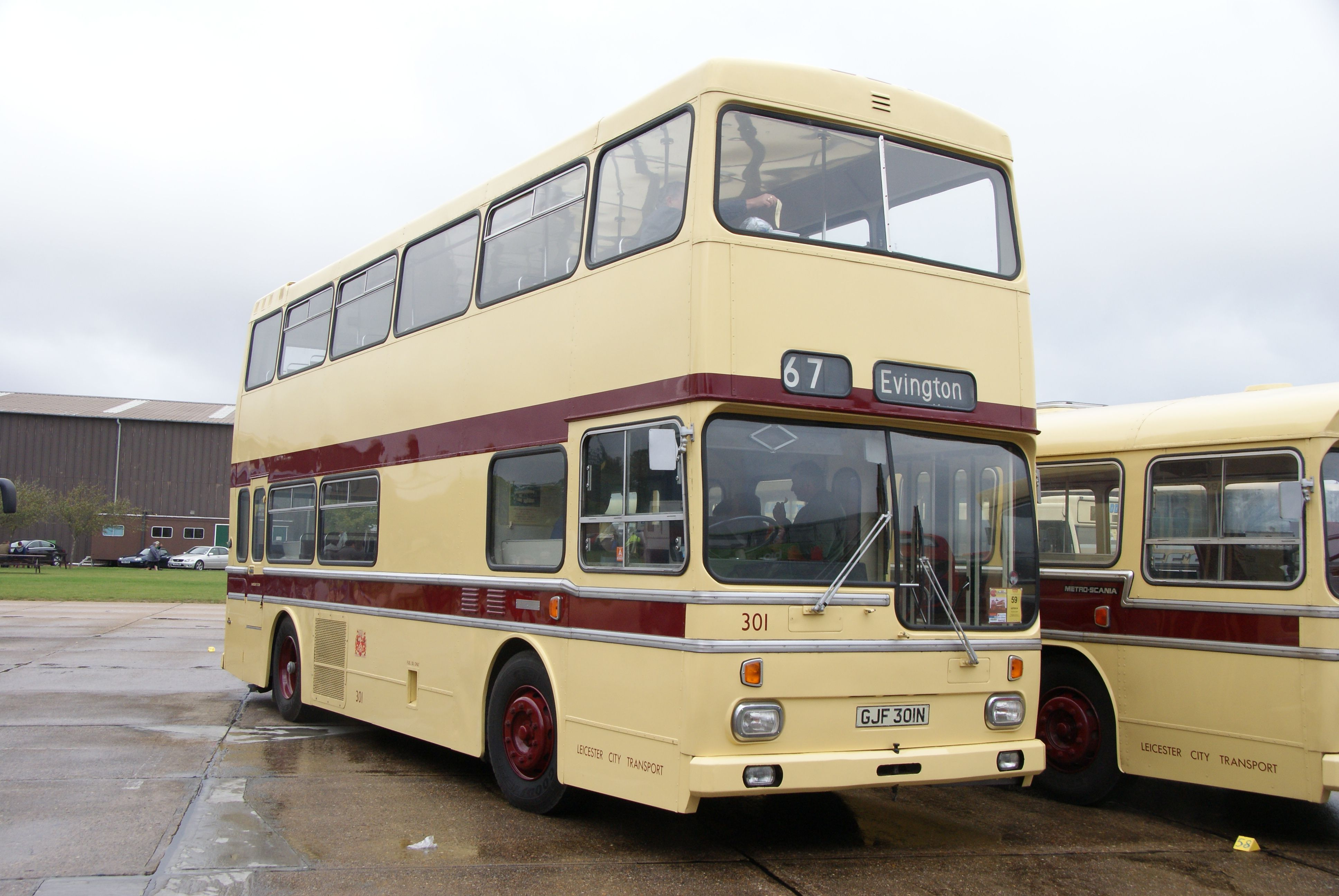 GJF301N 260910 CPS